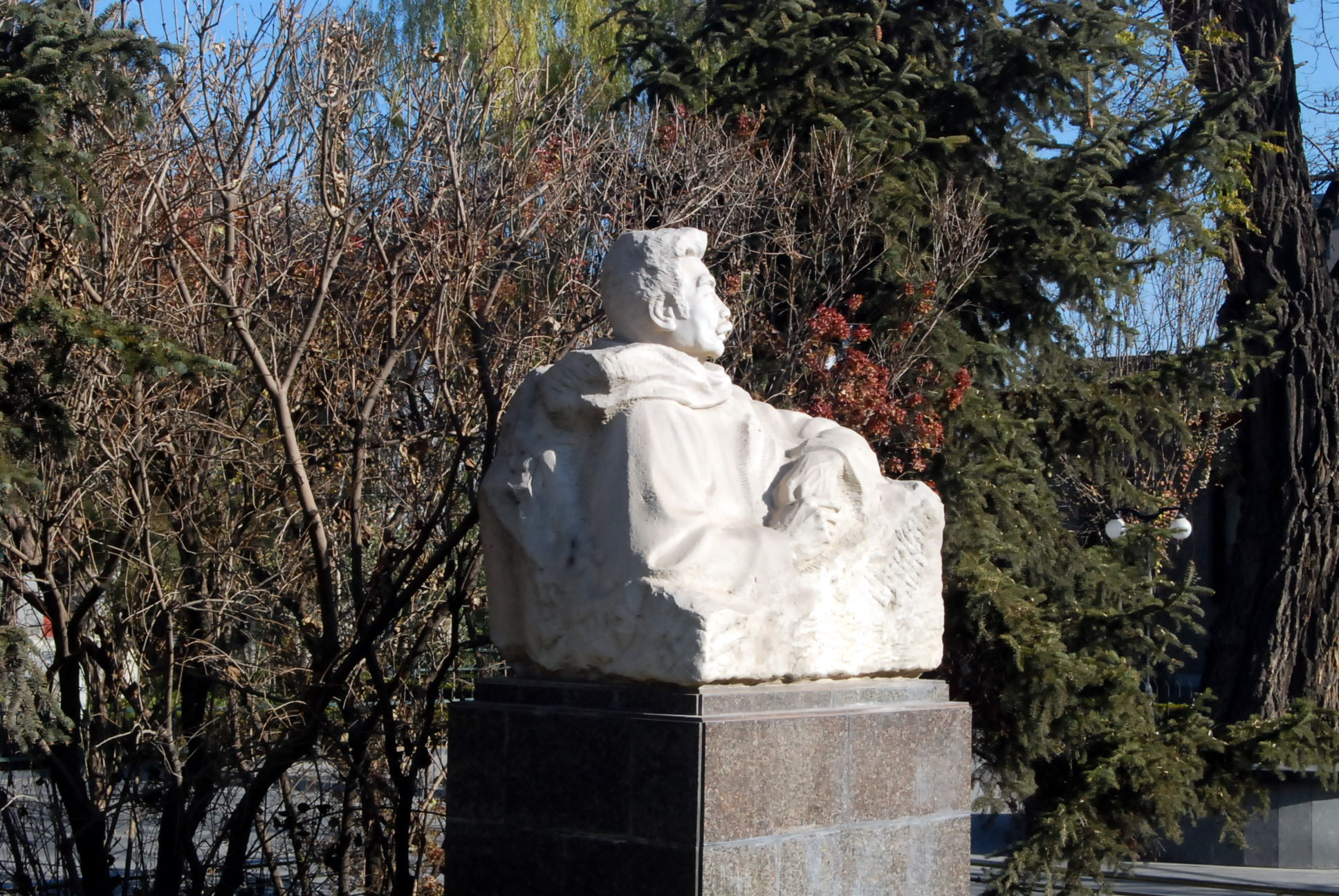 鲁迅博物馆鲁迅像